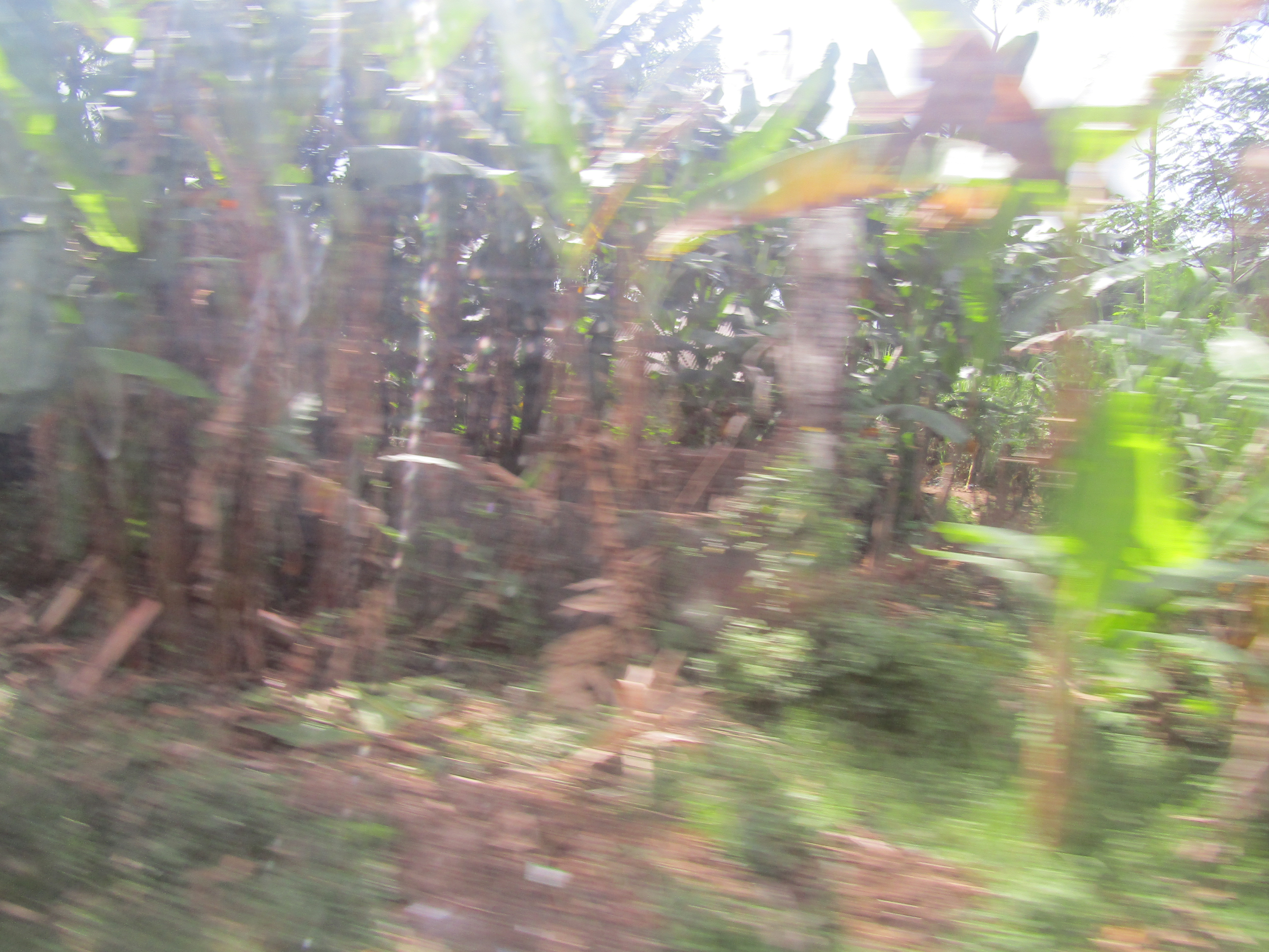 Bangunan Stasiun Buwek yang kini tinggal puing-puingnya